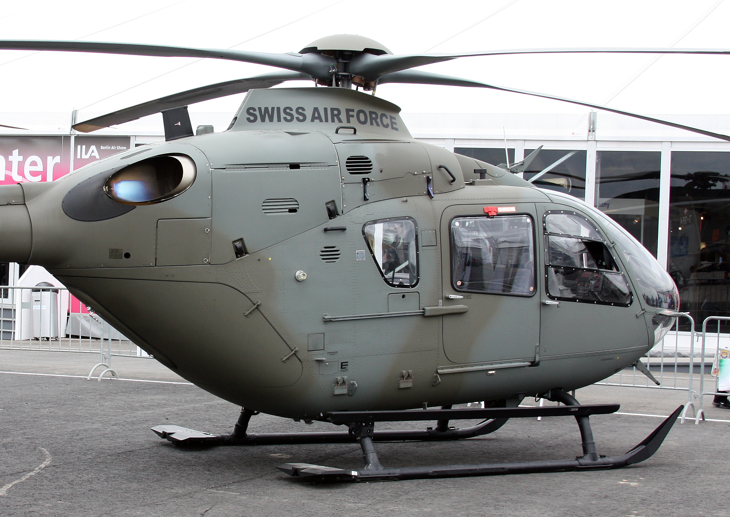 Eurocopter EC 635 P2+ auf der ILA 2010.